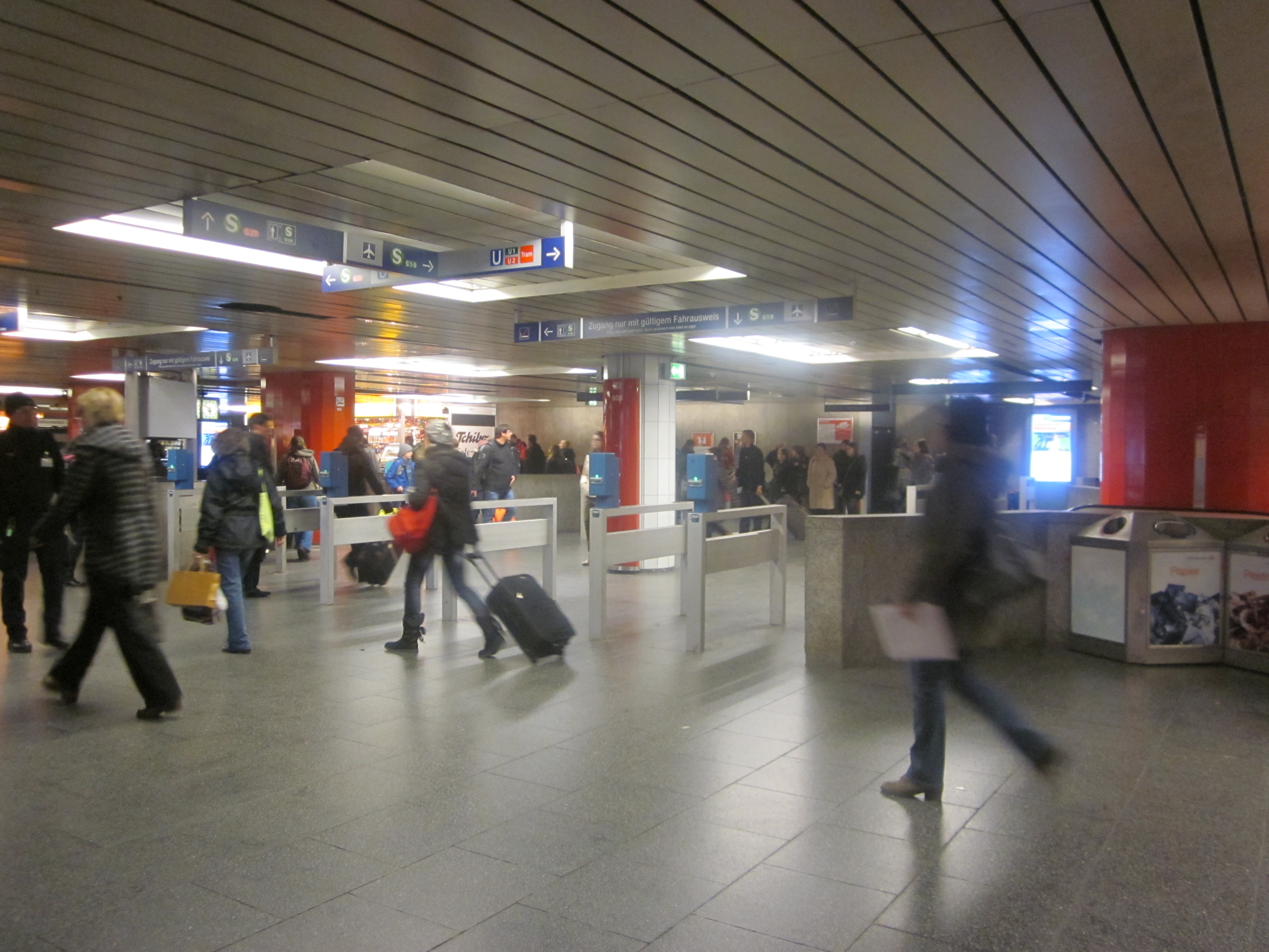 ミュンヘン中央駅での改札